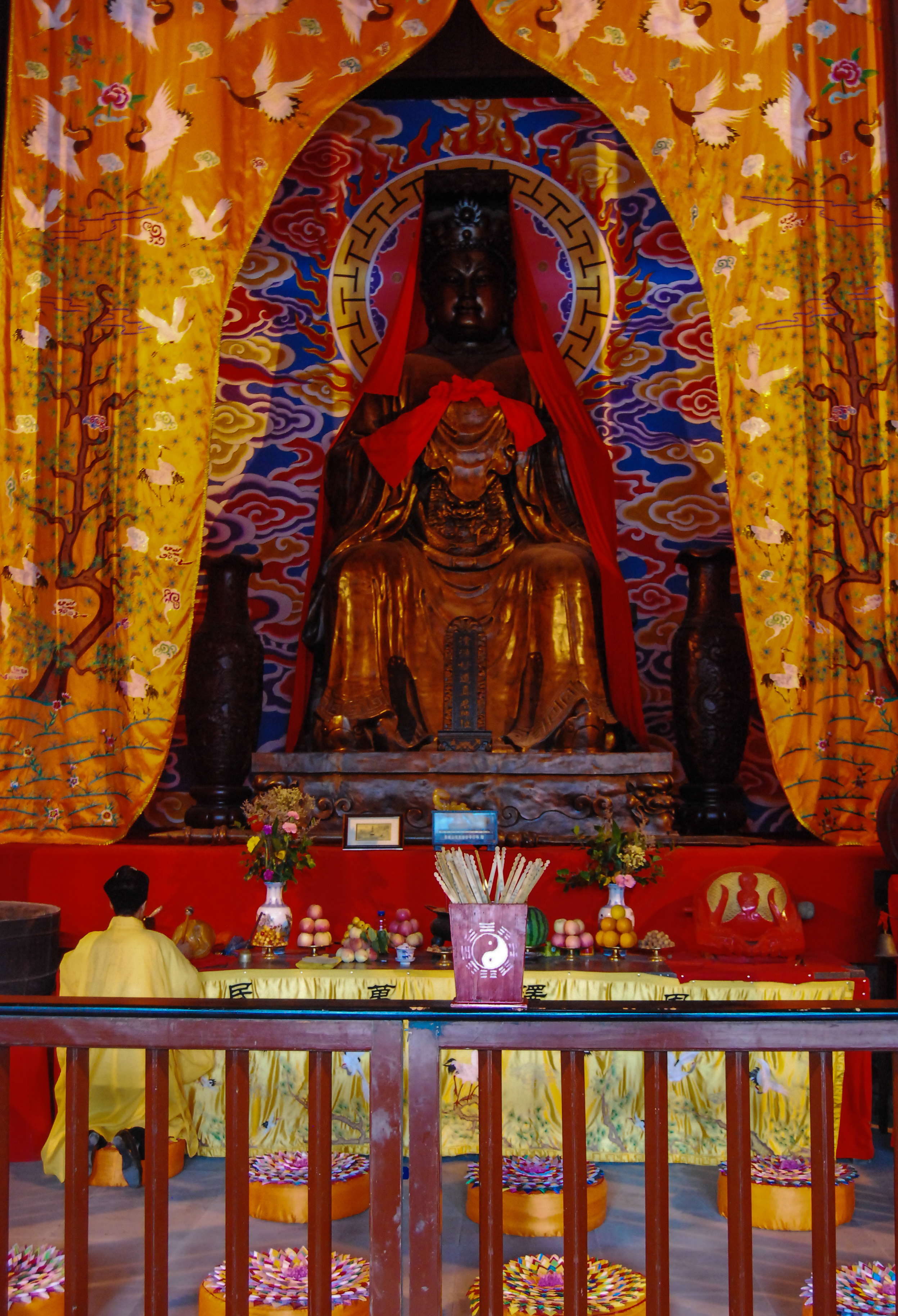 中文（中国大陆）: 李冰之子二郎像，清源妙道真君